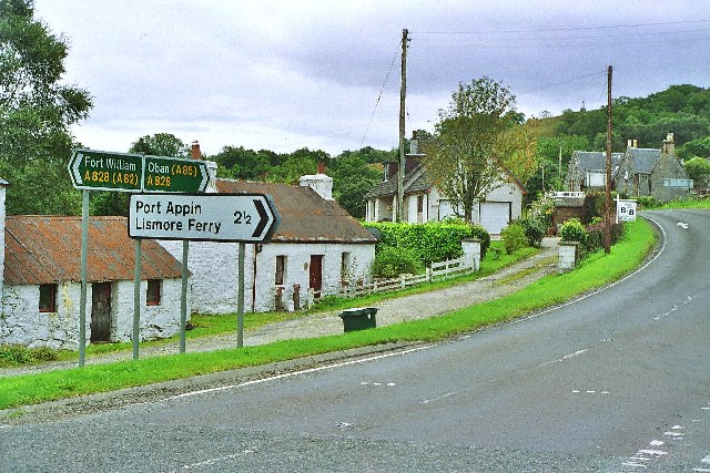 Appin Village